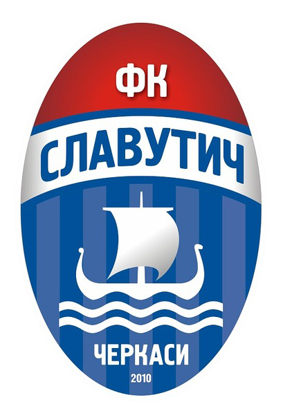 Емблема футбольного клубу «Славутич» (Черкаси)